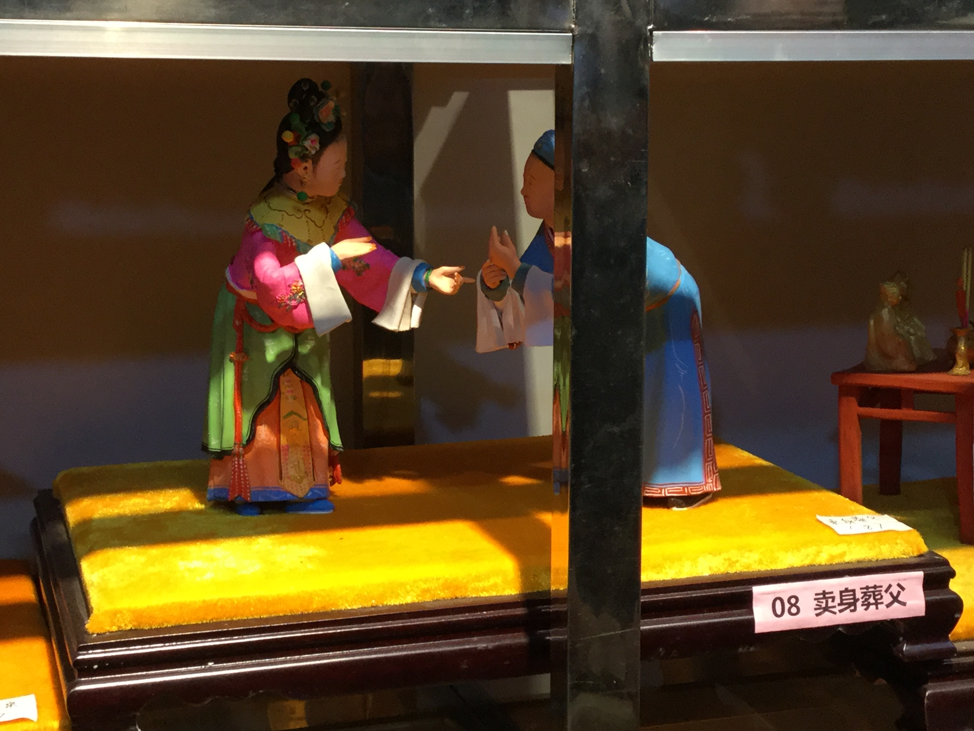 翁仔灯《卖身葬父》，摄于2018年3月2日。